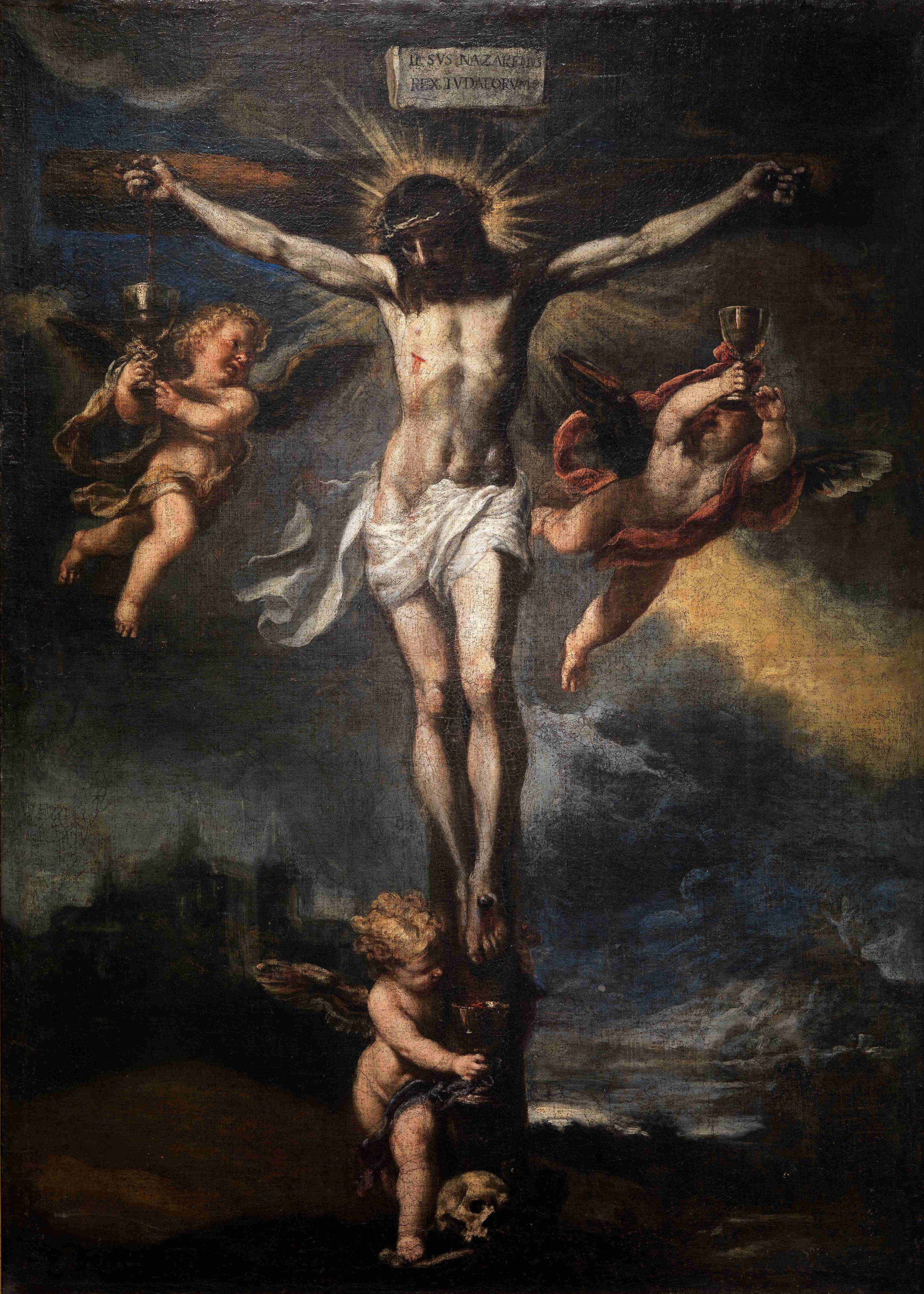 Cristo de la Sangre. Mateo Cerezo el Joven (?). 1664-1665. Óleo sobre lienzo. Museo de Burgos - Sección de Bellas Artes. Nº Inv. 3.930.